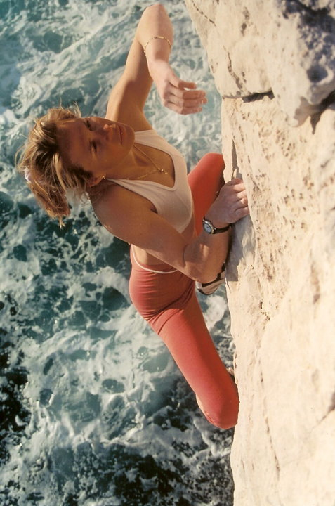 Escalade dans les Callanques